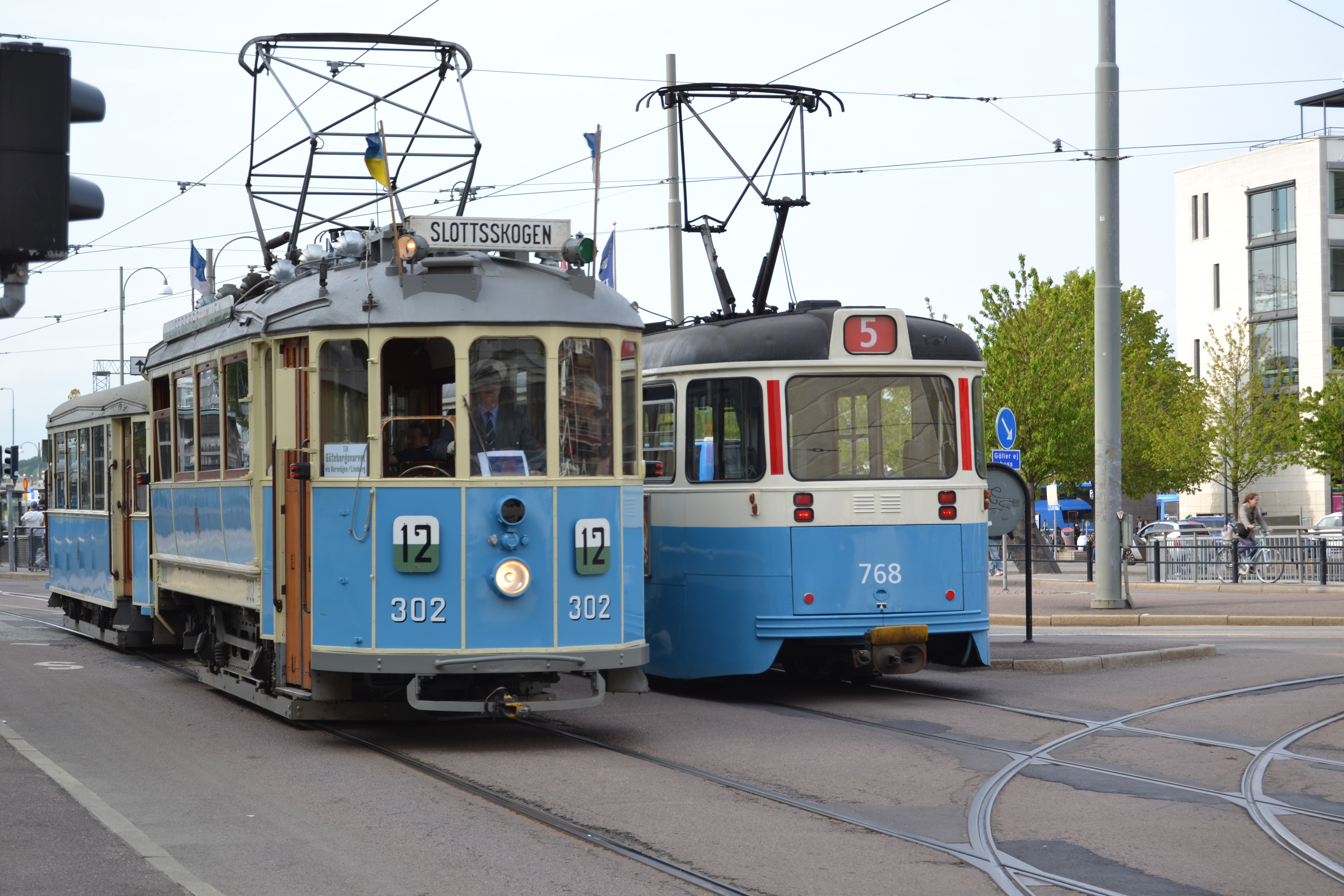 Ringlinjens spårvagn Linje 12 vid Drottningstorget